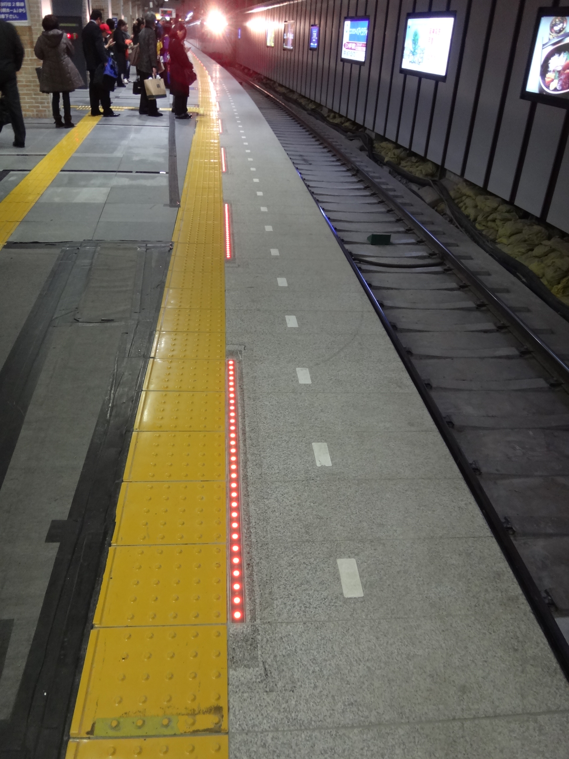 阪神・三宮駅のホームに設置された発光式列車案内表示器